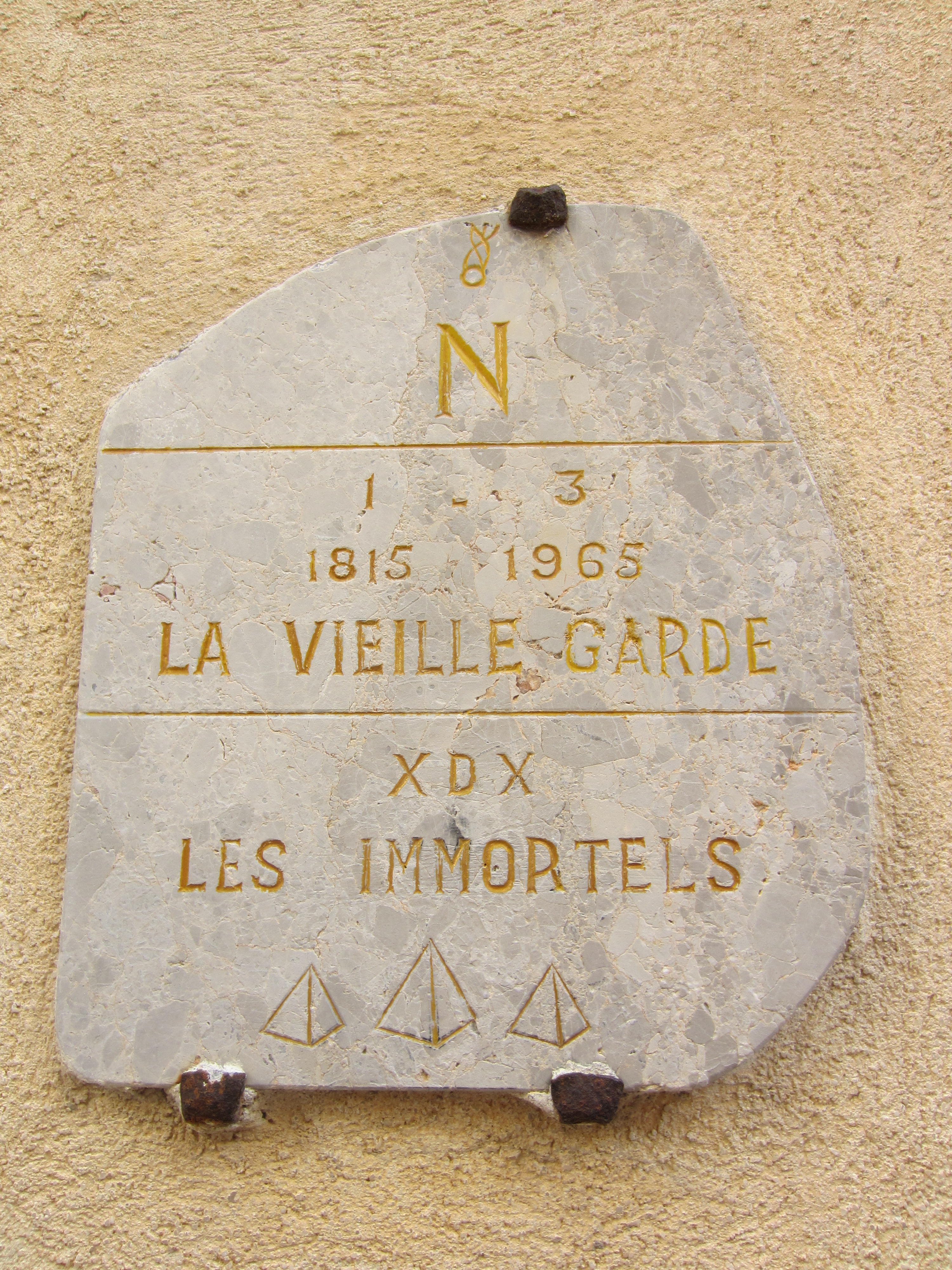 Description plaque vieille garde chapelle st esprit napoleon Antibes Date13 December 2011Sourcemon appareil photoAuthorAimelaimePermission (Reusing this file) plaque vieille garde chapelle st esprit napoleon Antibes